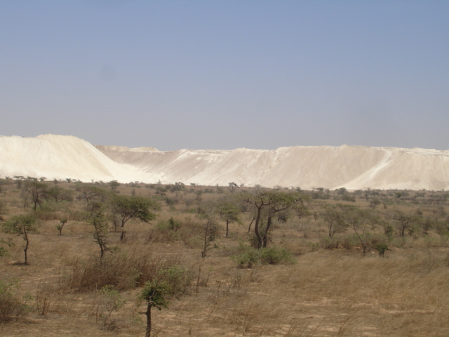 Mine de phosphate à ciel ouvert dans l'ouest du Sénégal (Taïba ?)